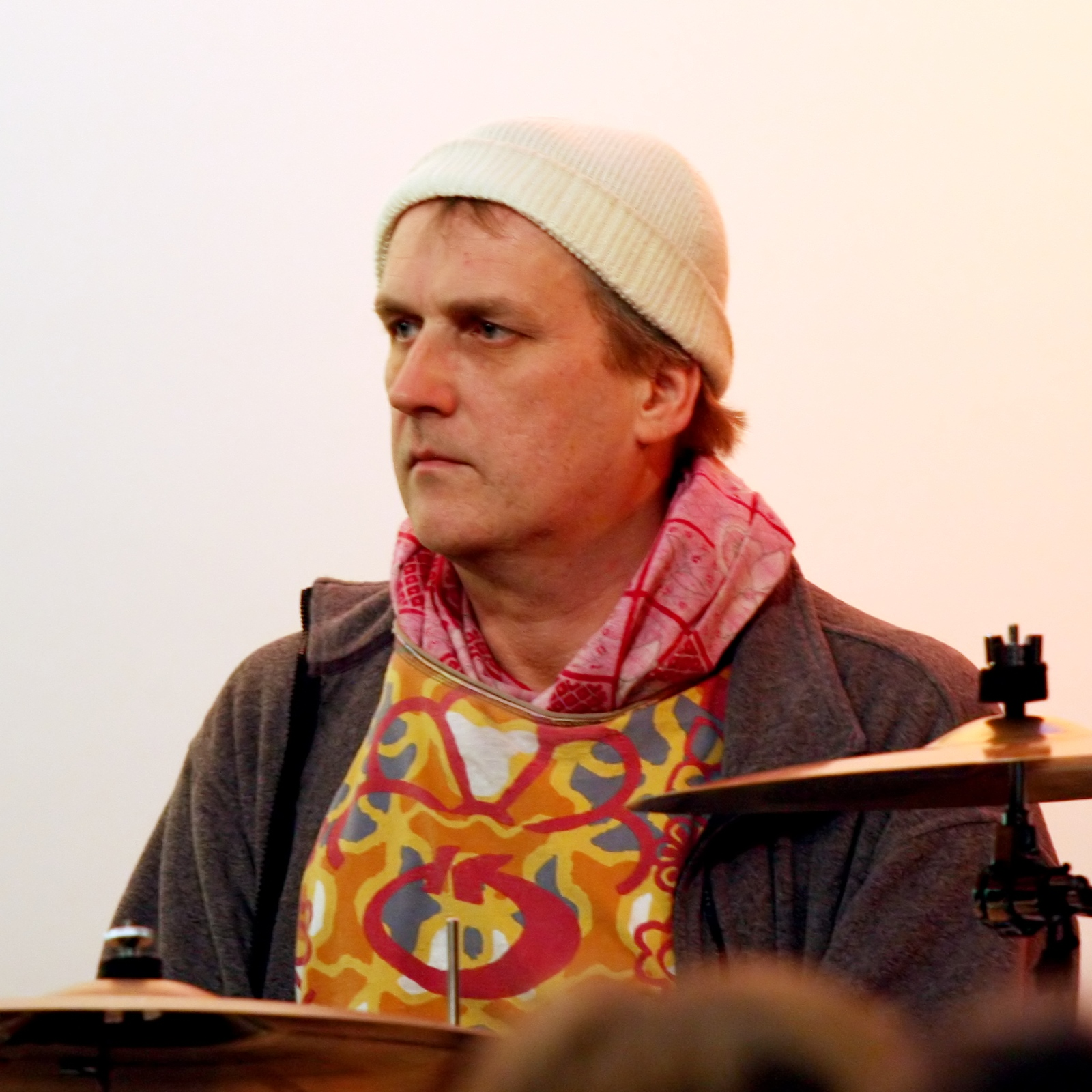 Peter Kahlenborn, Schlagzeuger der Gruppe „Borderland“. Auftritt im Domform Köln